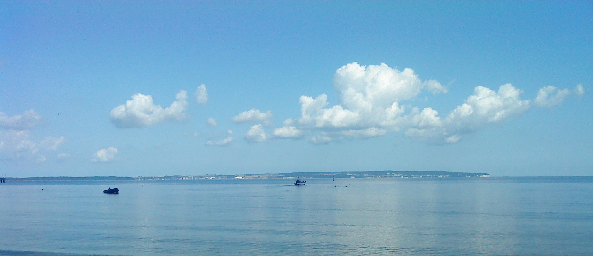 Jasmund von Südosten, mit Mukran, Saßnitz